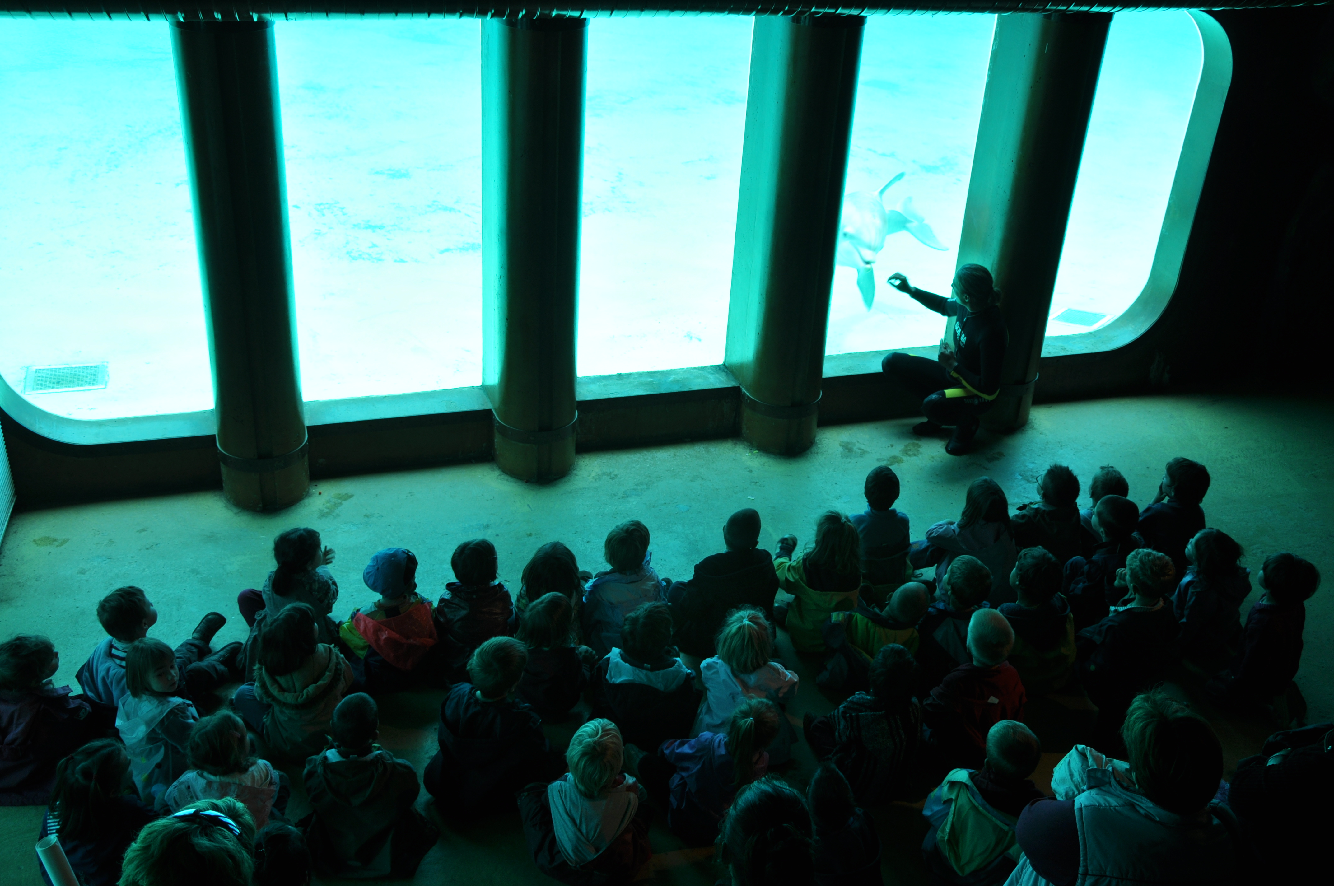 Séance pédagogique à l'intention des scolaires dans la galerie sous marine du parc animalier Planète Sauvage.